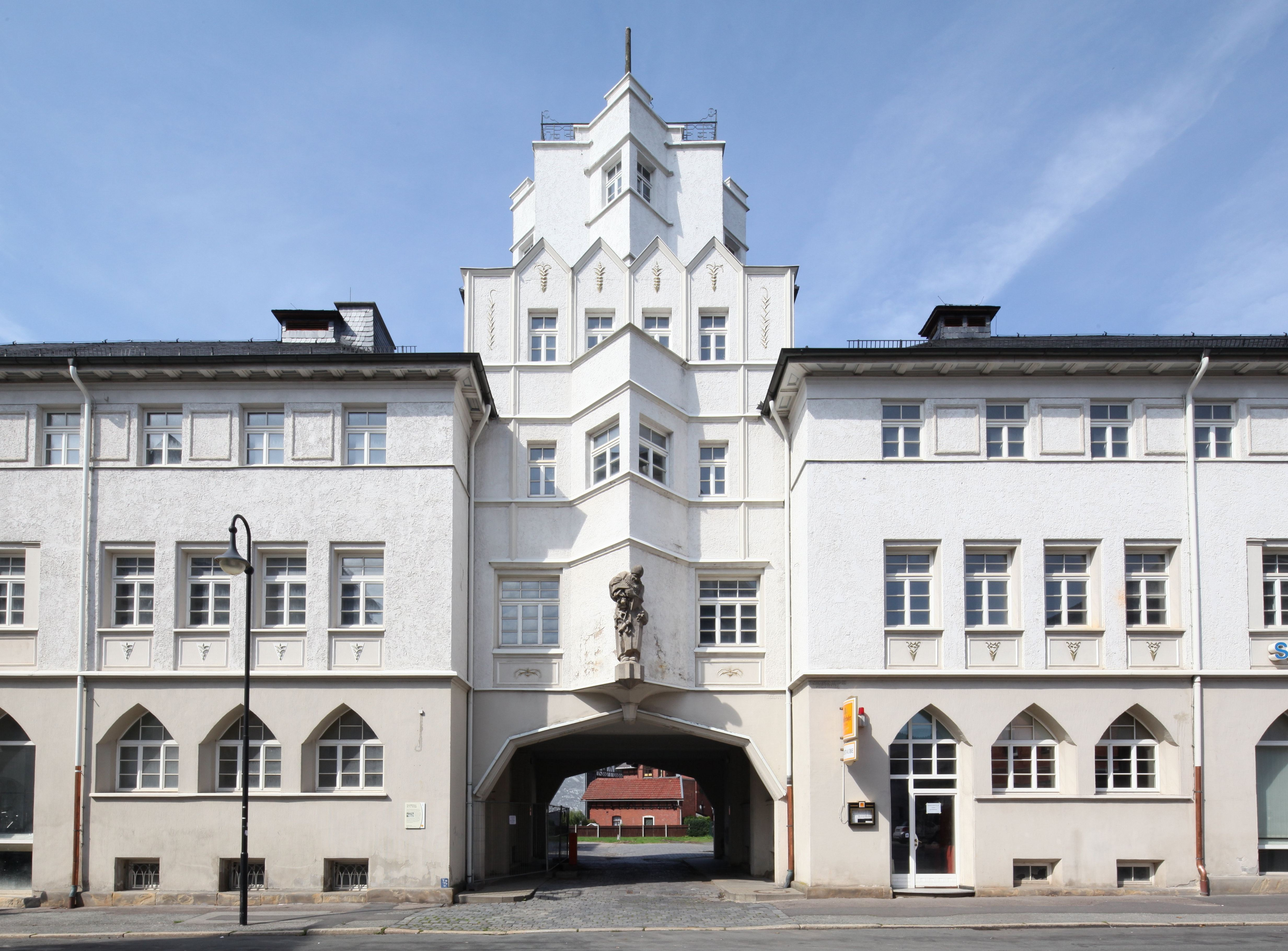 Ehem. Geschäftshaus S.S. Kresge & Co., 1921 von Franz Boxberger und Ernst Herbart, Erweiterung 1927/28 von Walter Buchholz, Sonneberg, Gustav-König-Straße 10Torturm mit Stilformen des Expressionismus, Bauplastik stellt den Weihnachtsmann dar